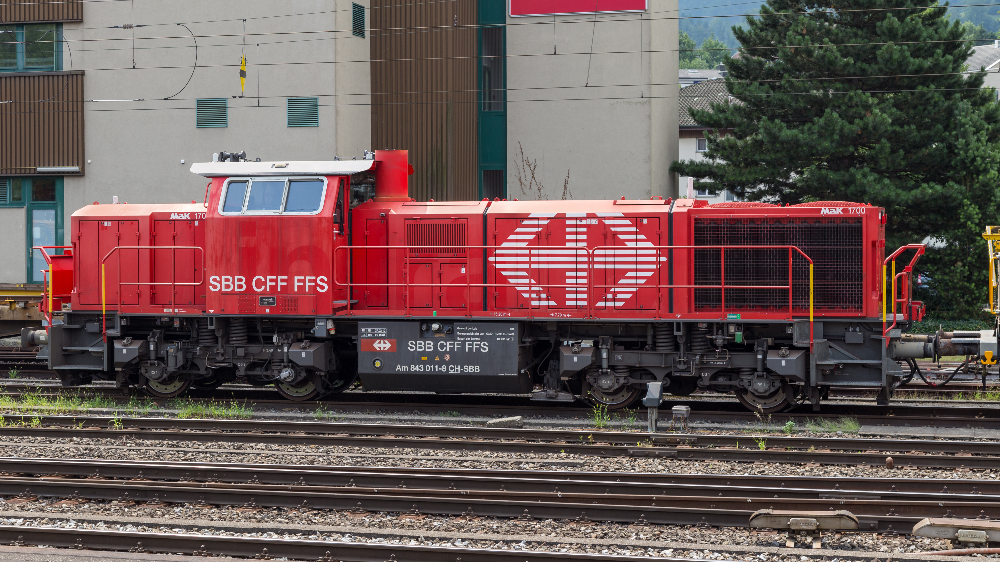 Dieselhydraulische Lokomotive SBB 843 011-8 (Vossloh MaK G 1700) in Arth Goldau in 2015